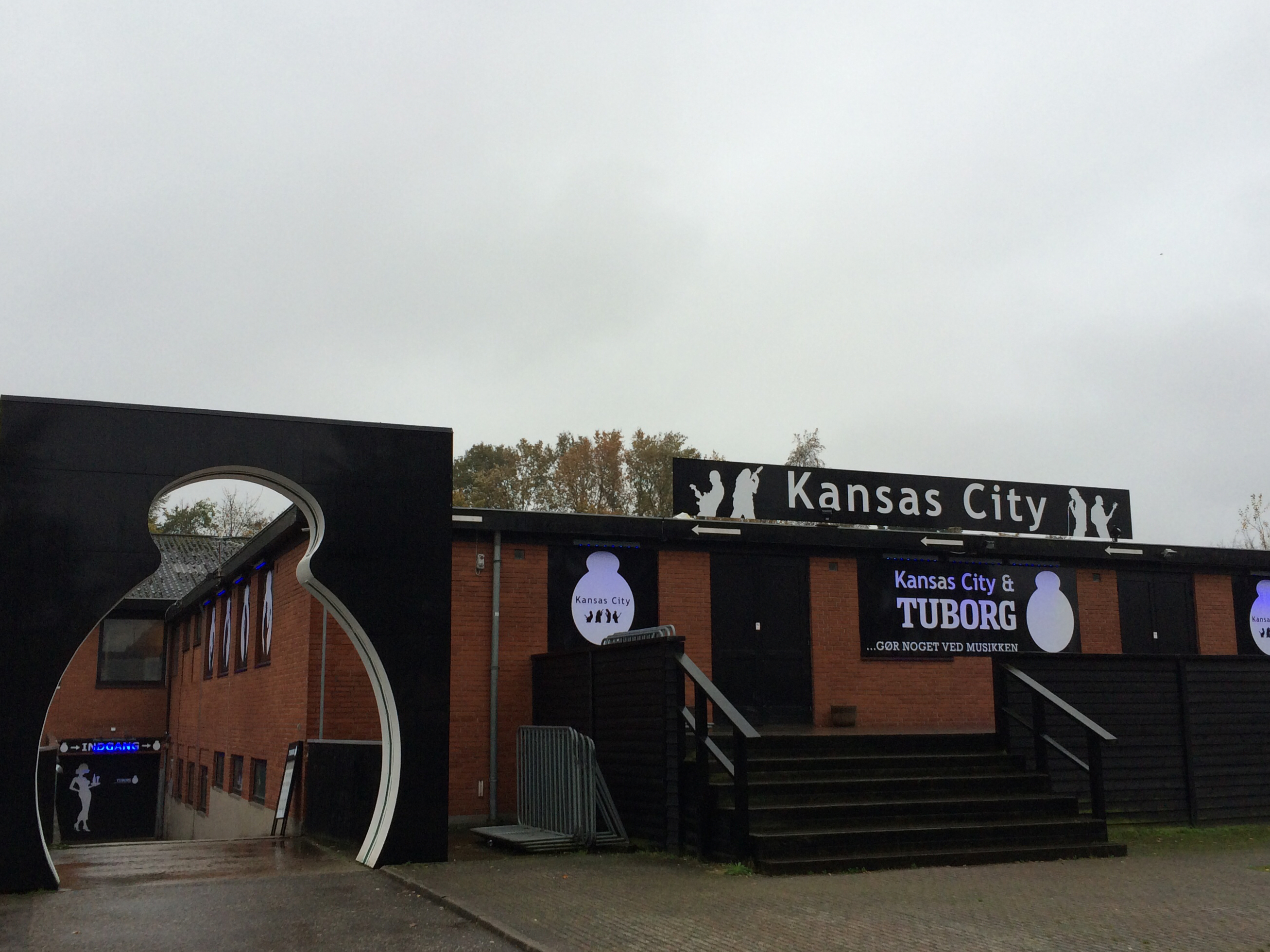 Spillested og øvelokaleforening. November 2014.